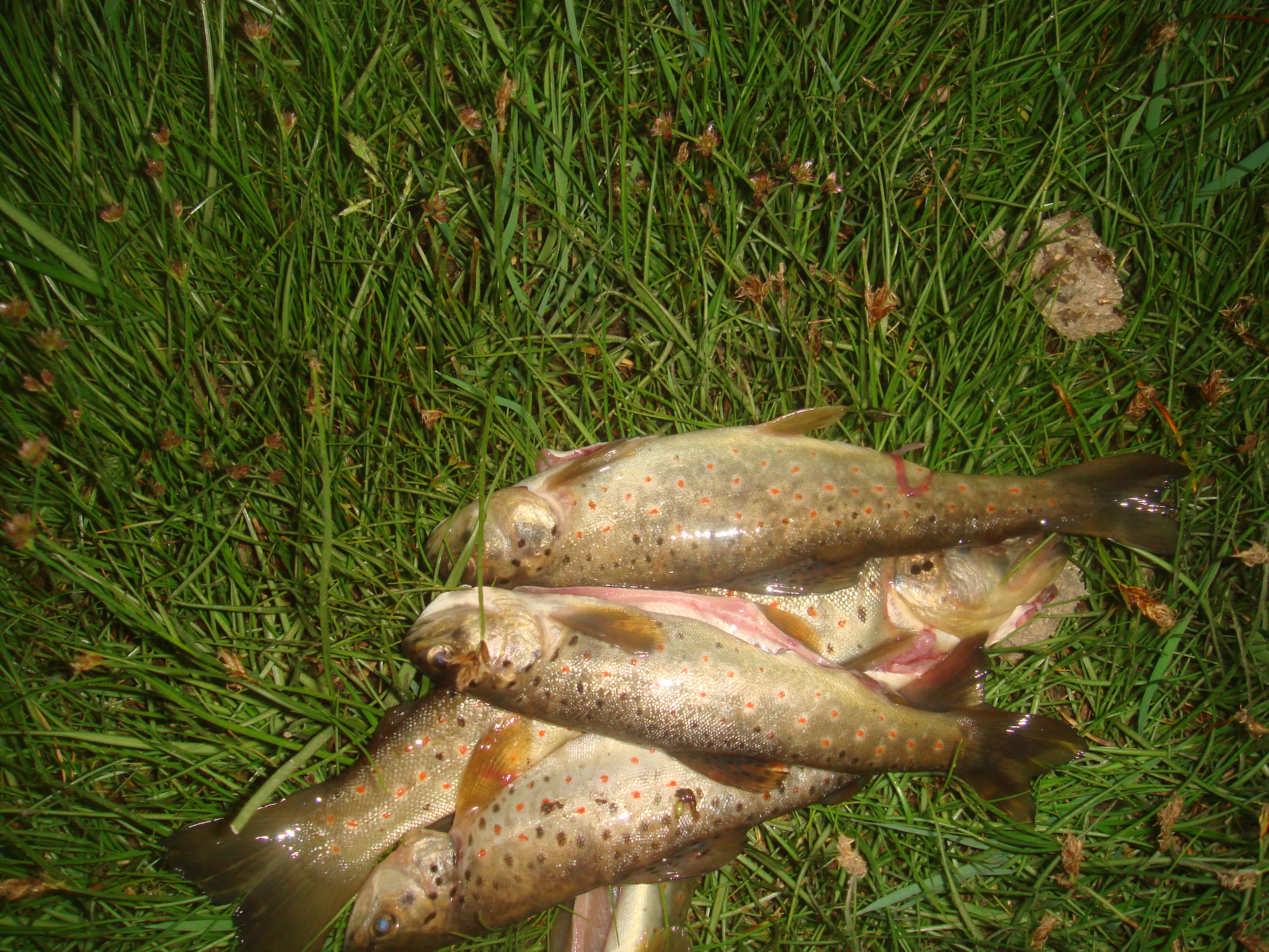 نوعی ماهی مشهور به خال دار که در دریای ورسج یافت میشود.